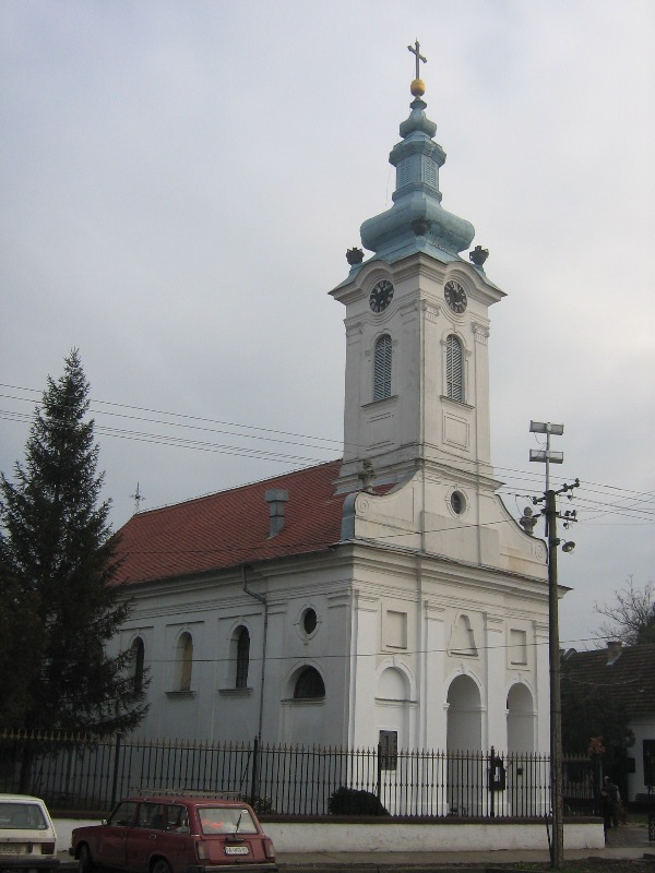 Српска православна црква у Ковину. Author:JustUser